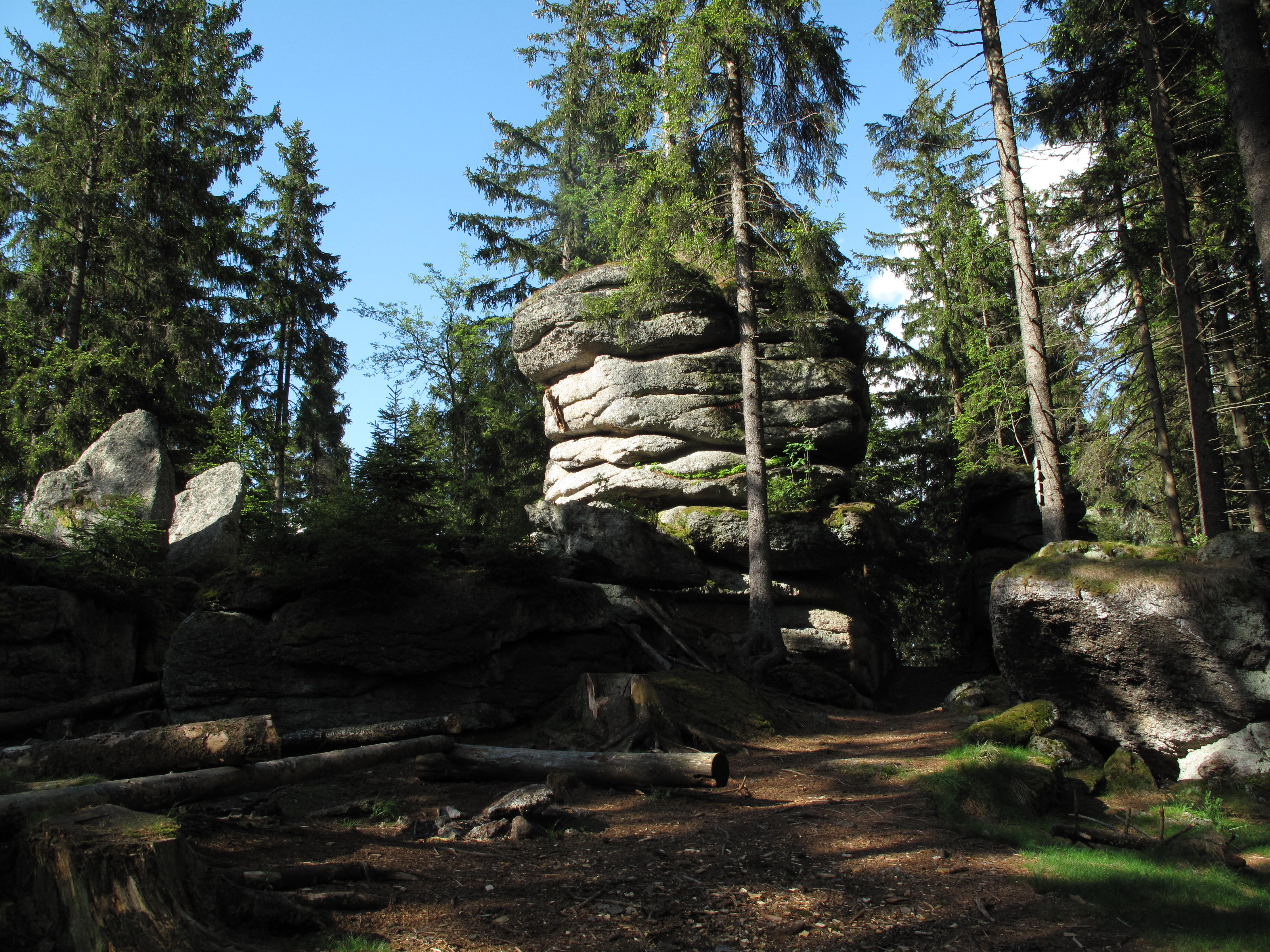 Kamenec